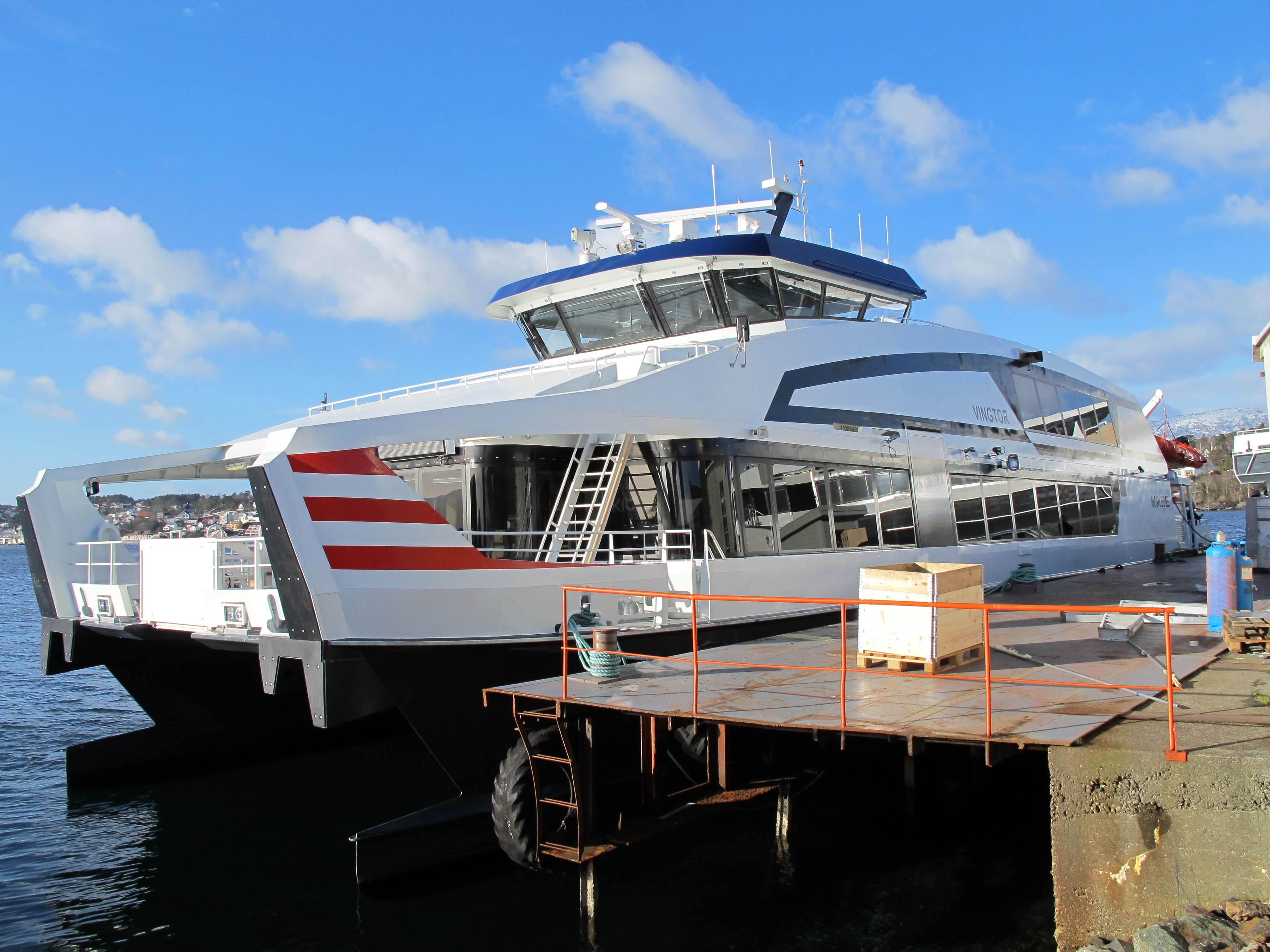 MS Vingtor ved Oma Baatbyggeri. Foto Harald Sætre.